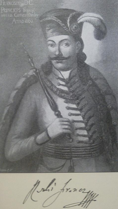 Rhédey Ferenc (c. 1610 – 1667) Erdély fejedelme 1657 és 1658 között.